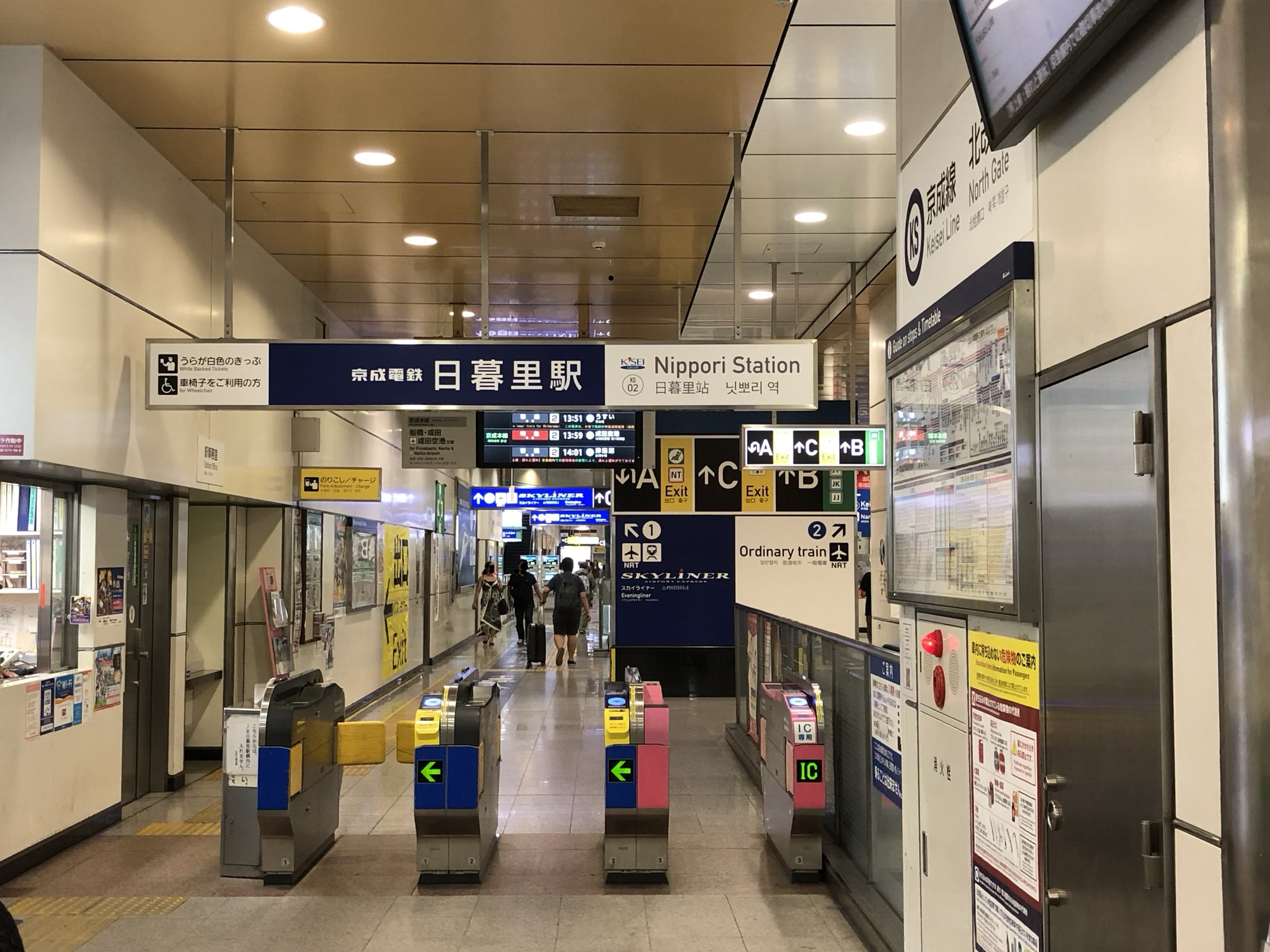 2019年9月に撮影した改修工事完了後の京成日暮里駅北口改札。